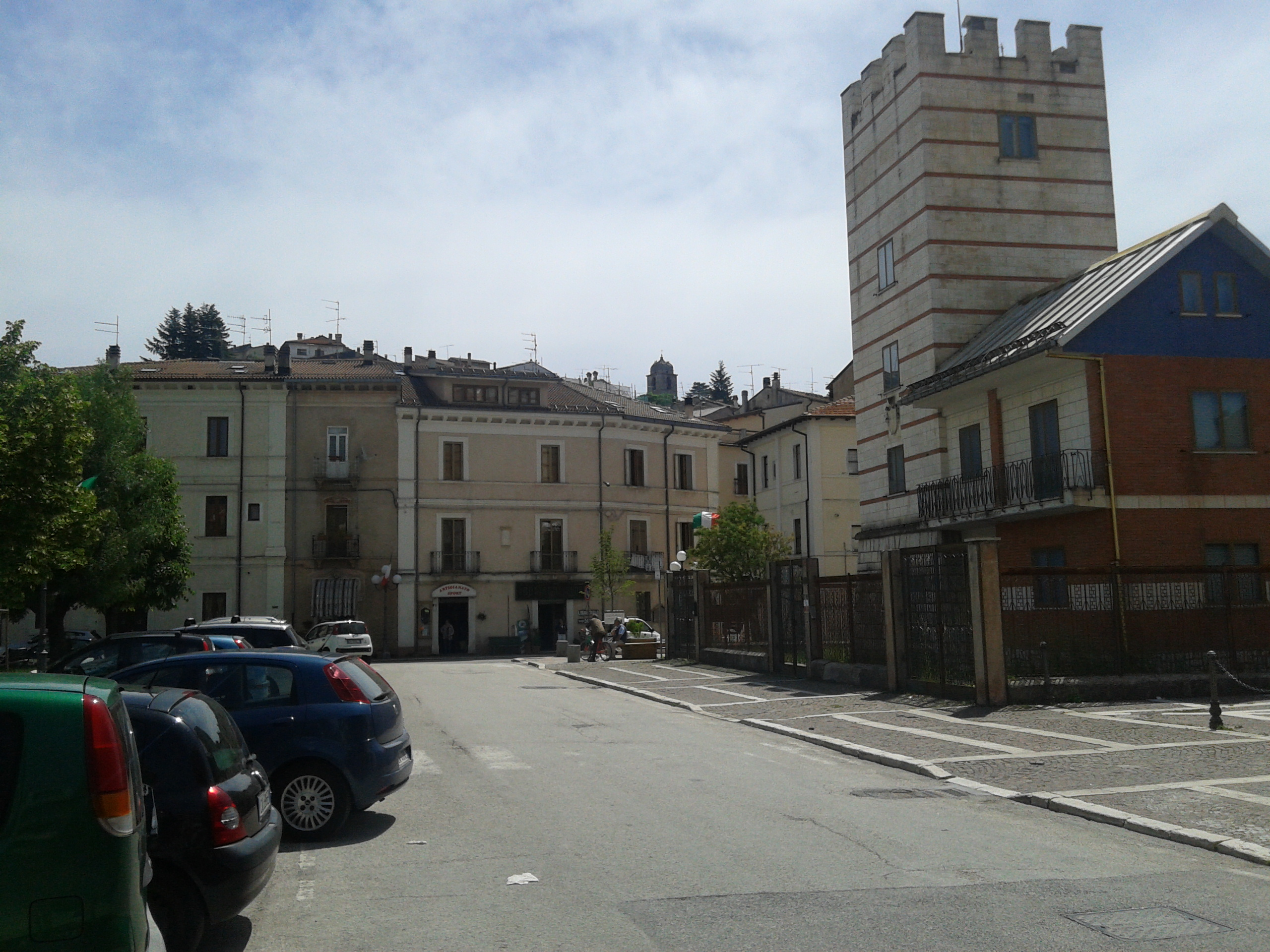 Scorcio fotografico di Rocca di Mezzo